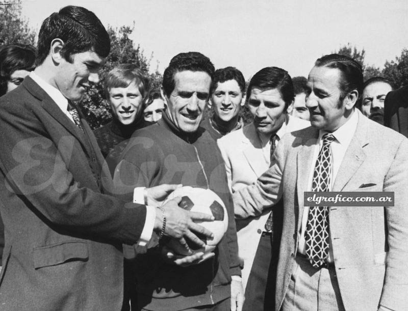 Boxer Carlos Monzón (left) and football managers Helenio Herrera (center) and Juan C. Lorenzo, together.